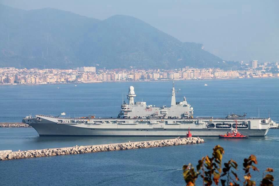 La portaerei Cavour a Salerno durante l'esercitazione internazionale TWIST (24-27 ottobre 2013)